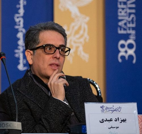 بهزاد عبدی - ۱۳۹۸